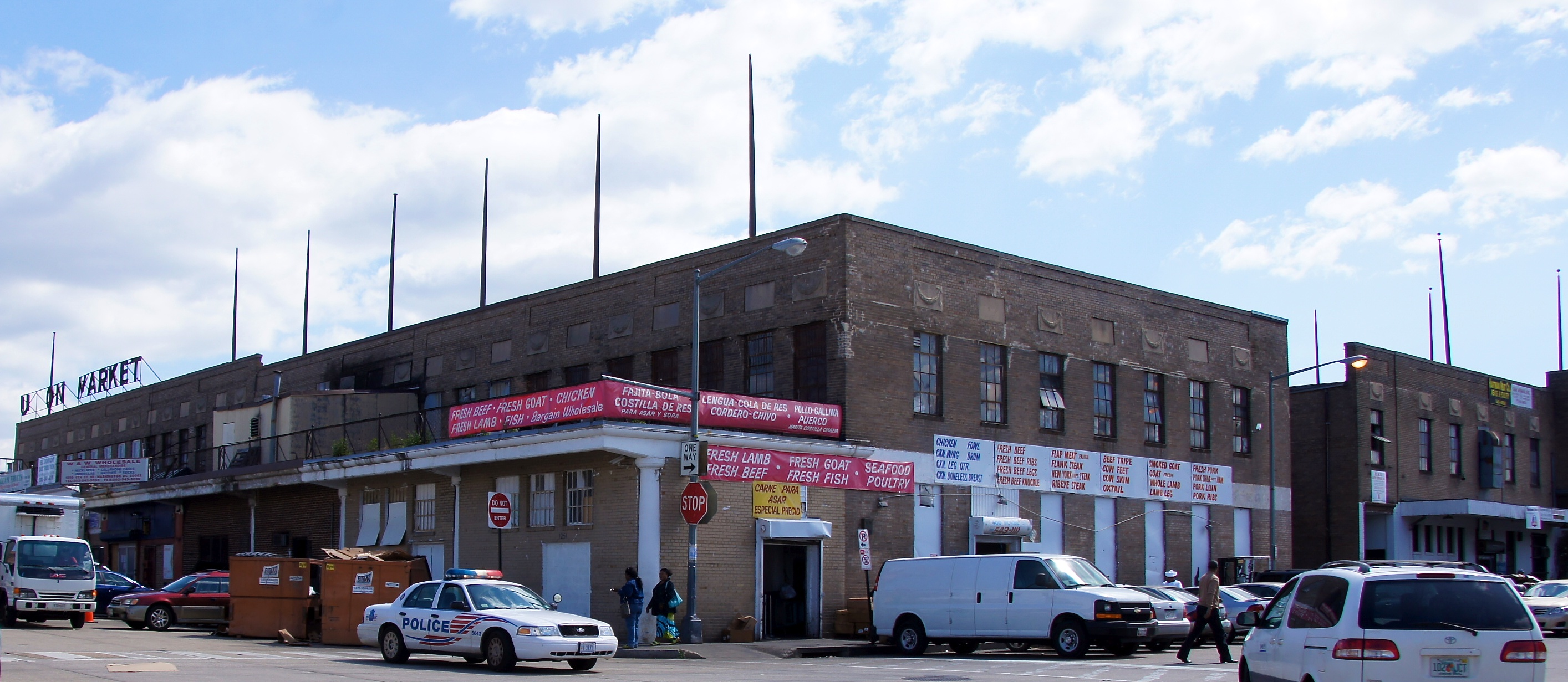 2012 Florida Avenue Market 11584